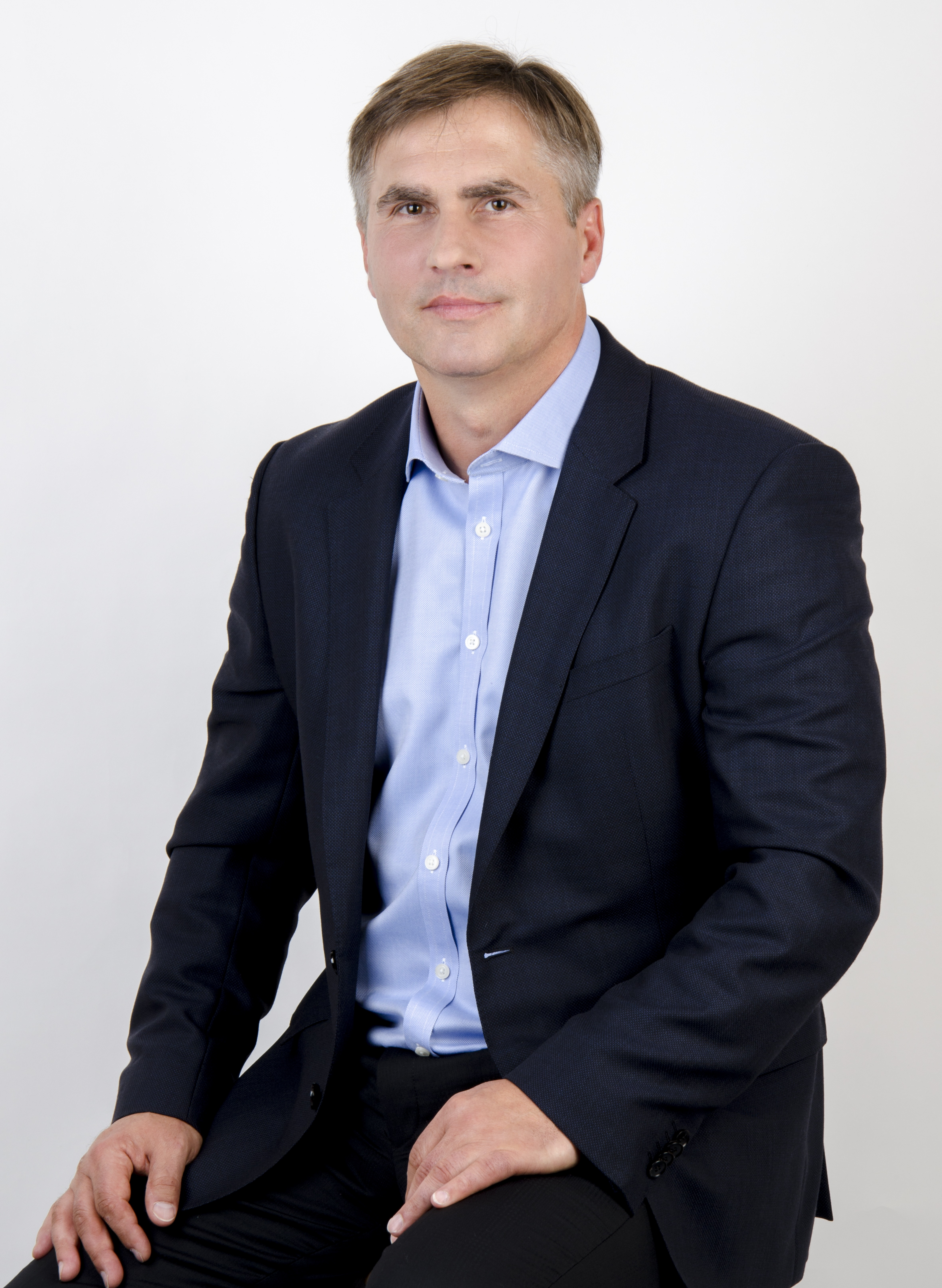 Zdjęcie portretowe - Dariusz Dziekanowski. Fot.Magdalena Znamionkiewicz